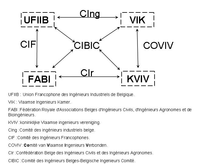 Description de l'organisation des fédérations d'ingénieurs en Belgique. Libre de droit et public